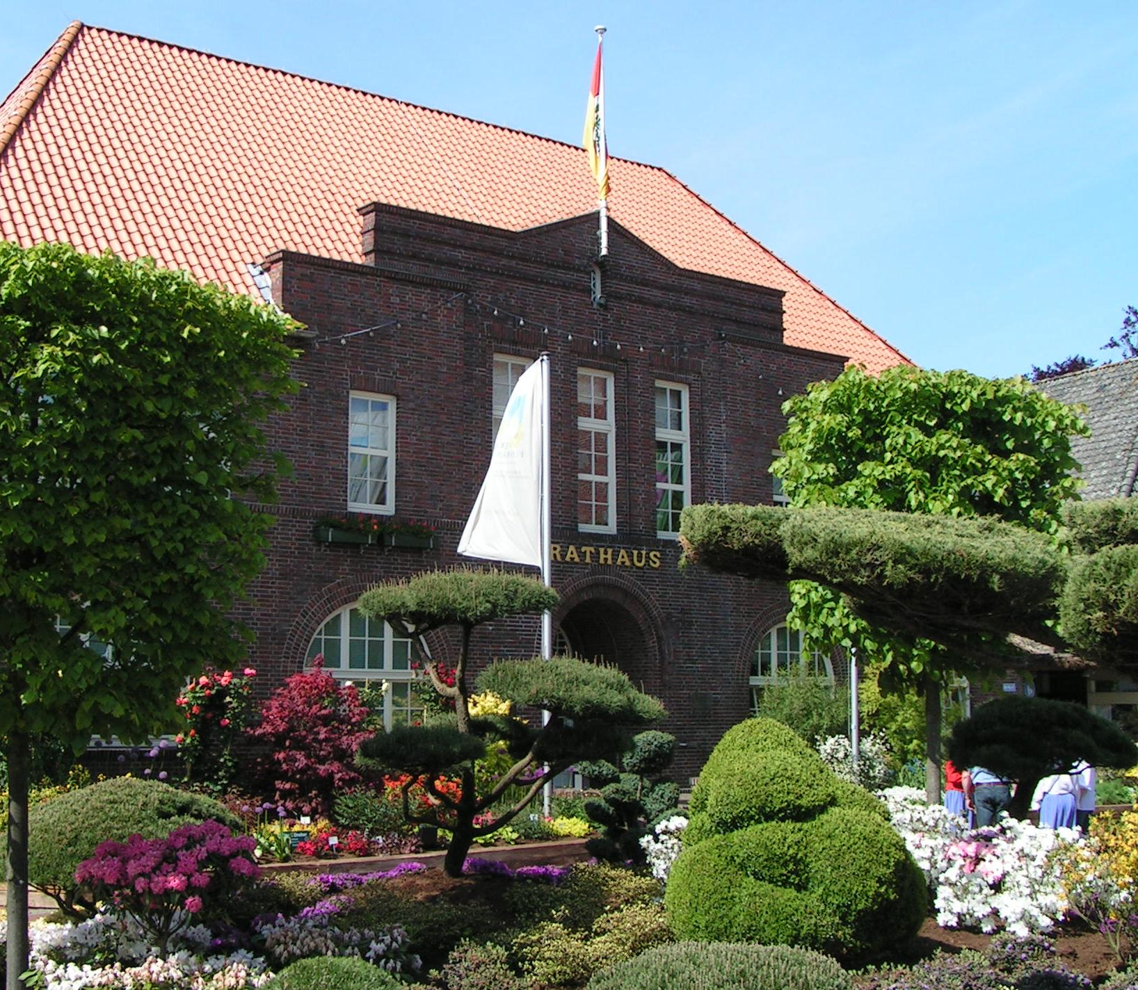 Rathaus Westerstede während der Rhodo 2010